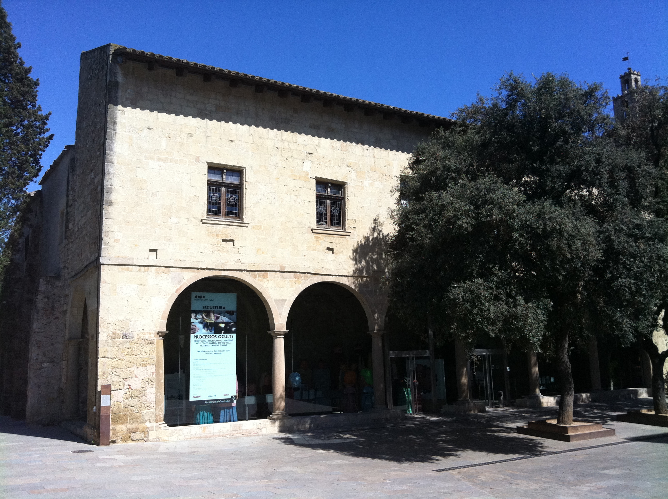 Museu de Sant Cugat